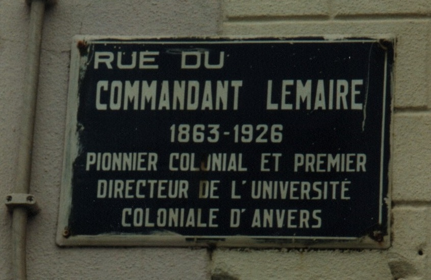 Straatnaambord 'Rue du Commandant Lemaire' (Cuesmes, Mons). Foto uit oktober 1997. Onderschrift: Pionnier colonial et premier directeur de l'Université Coloniale d'Anvers.